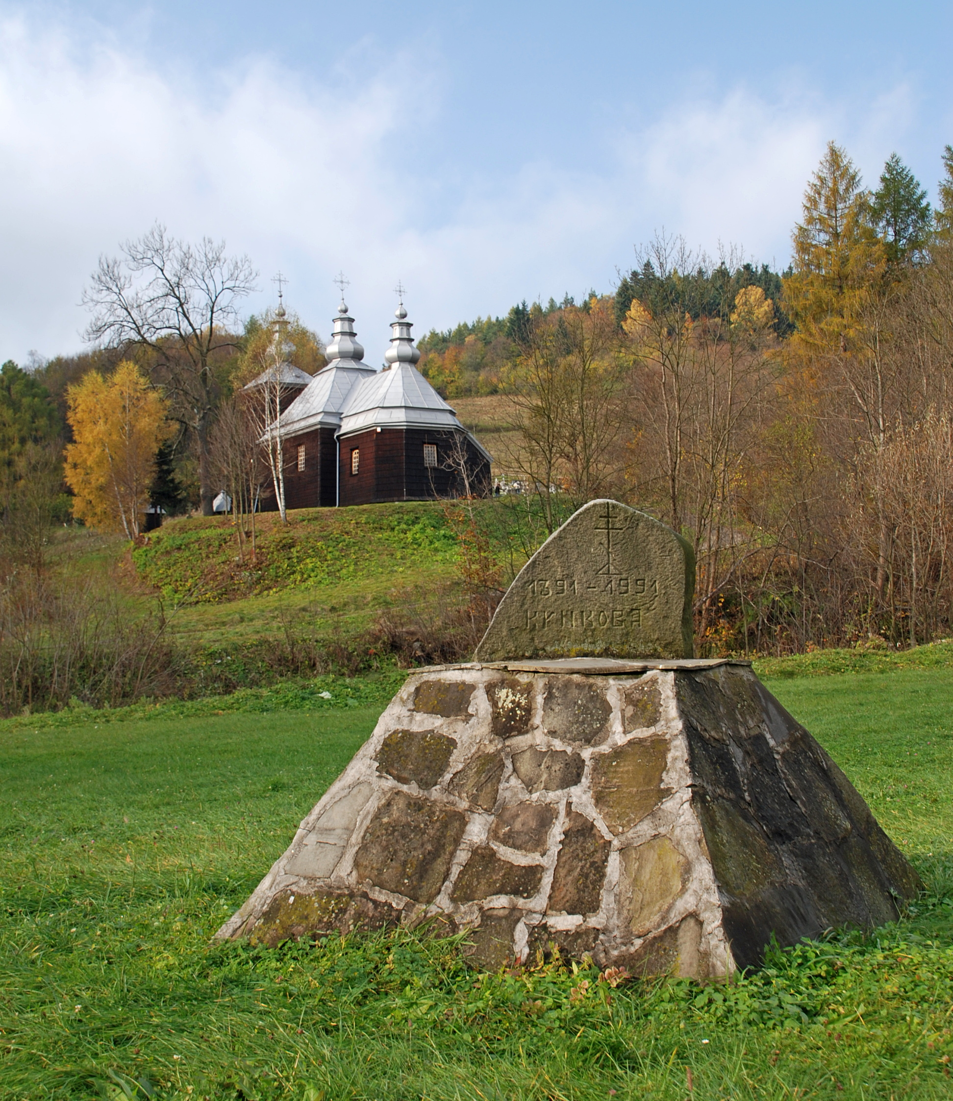 wieś Kunkowa